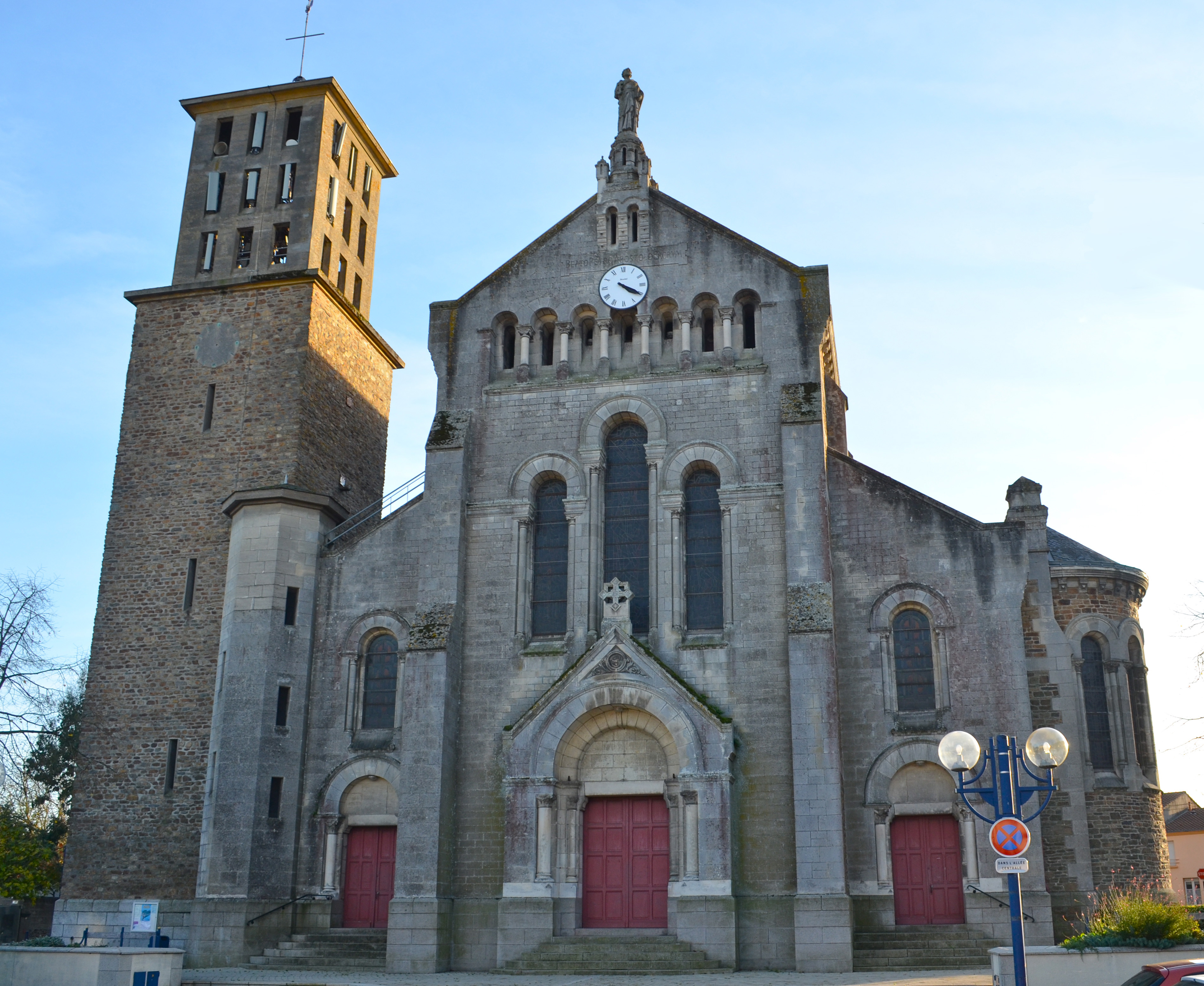 Eglise Saint-Pierre - Bouguenais (Loire-Atlantique)